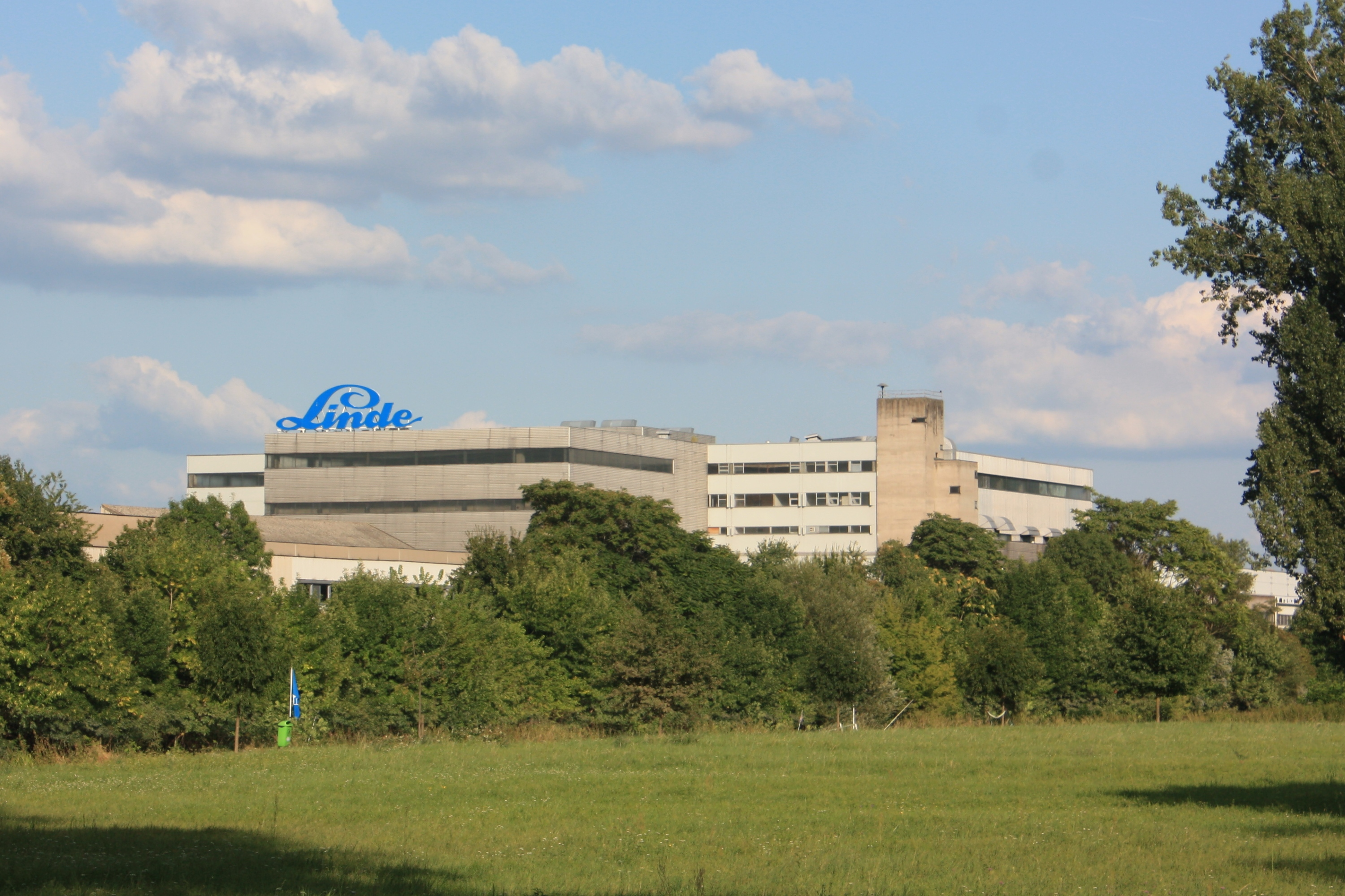 Gebäude der Linde Kältetechnik GmbH & Co.KG in Mainz-Kostheim, Wiesbaden